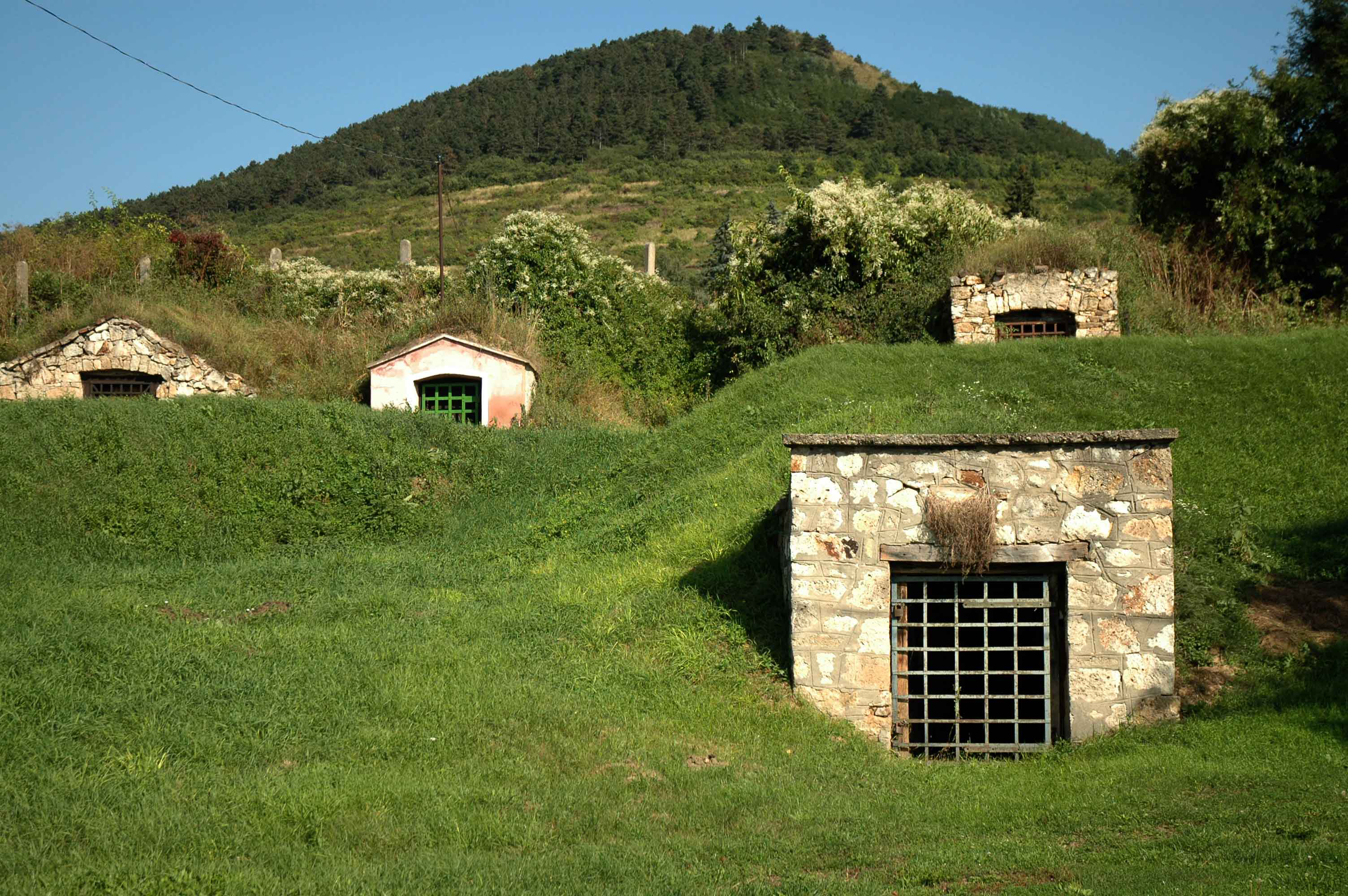 Traditionelle Tokajer-Weinkeller in der Weinbaugemeinde Abaújszántó im Weingebiet Tokaj, Ungarn.